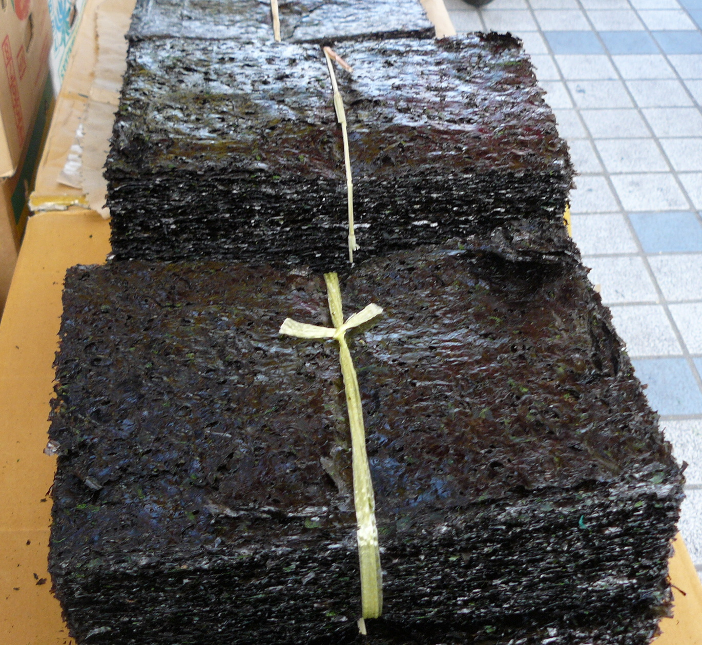 Gim (김), Korean laver